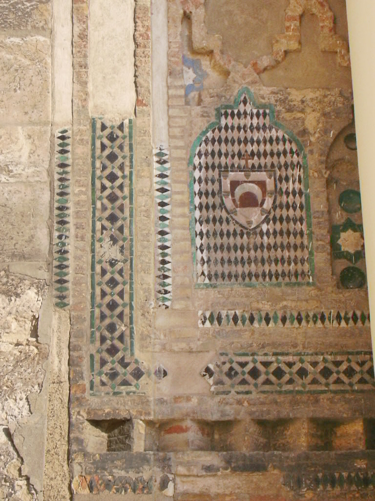 La Seo, detalle 2